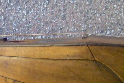 Nápolyi mandolin húrláb